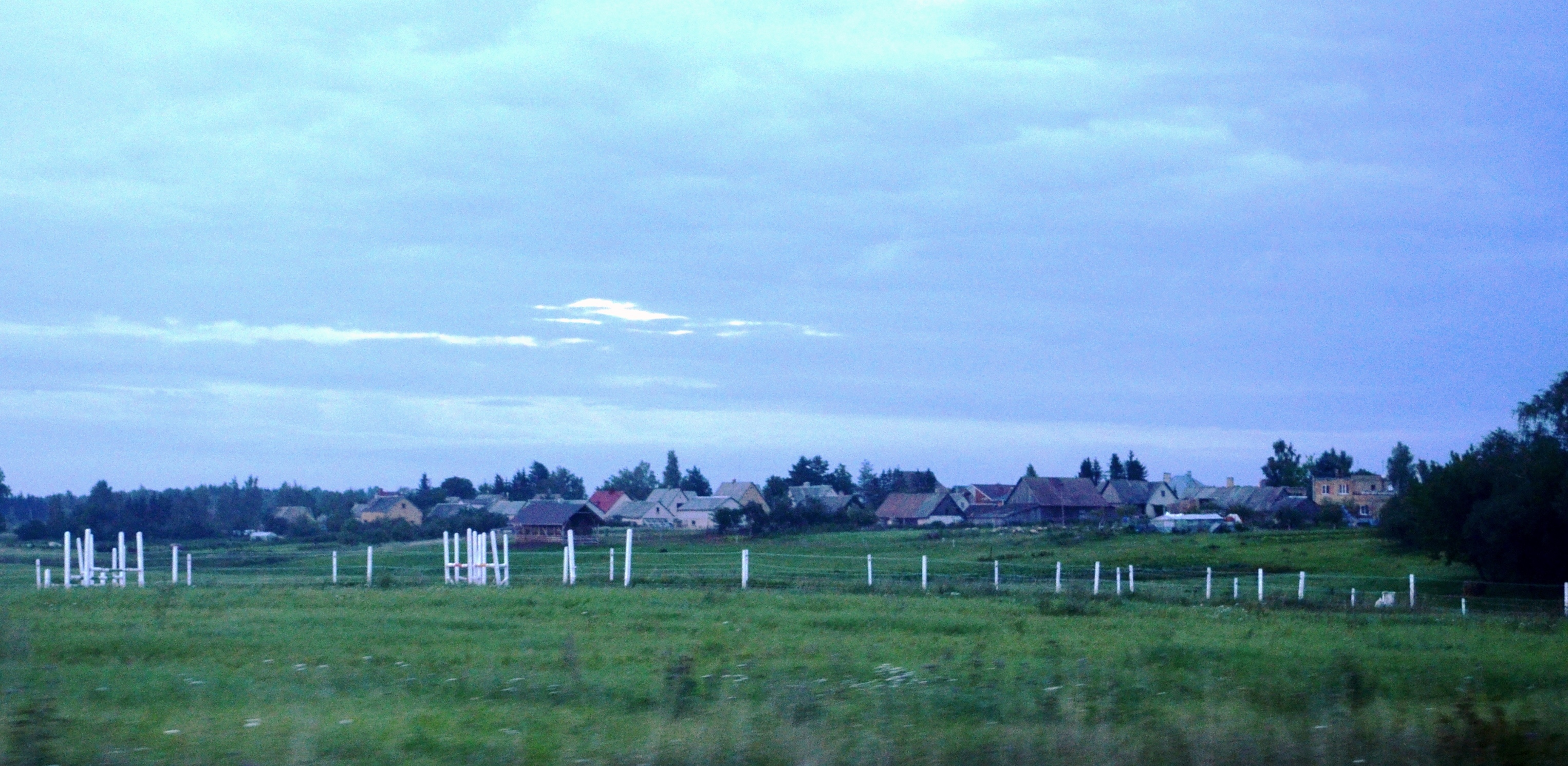 Molainiai, Panevėžio raj.